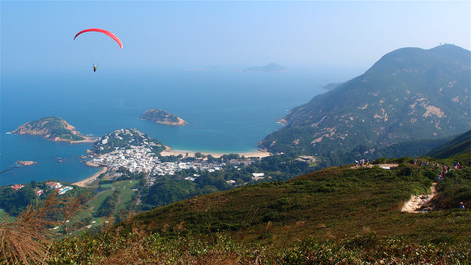 龍脊，飛翔傘的熱門地點